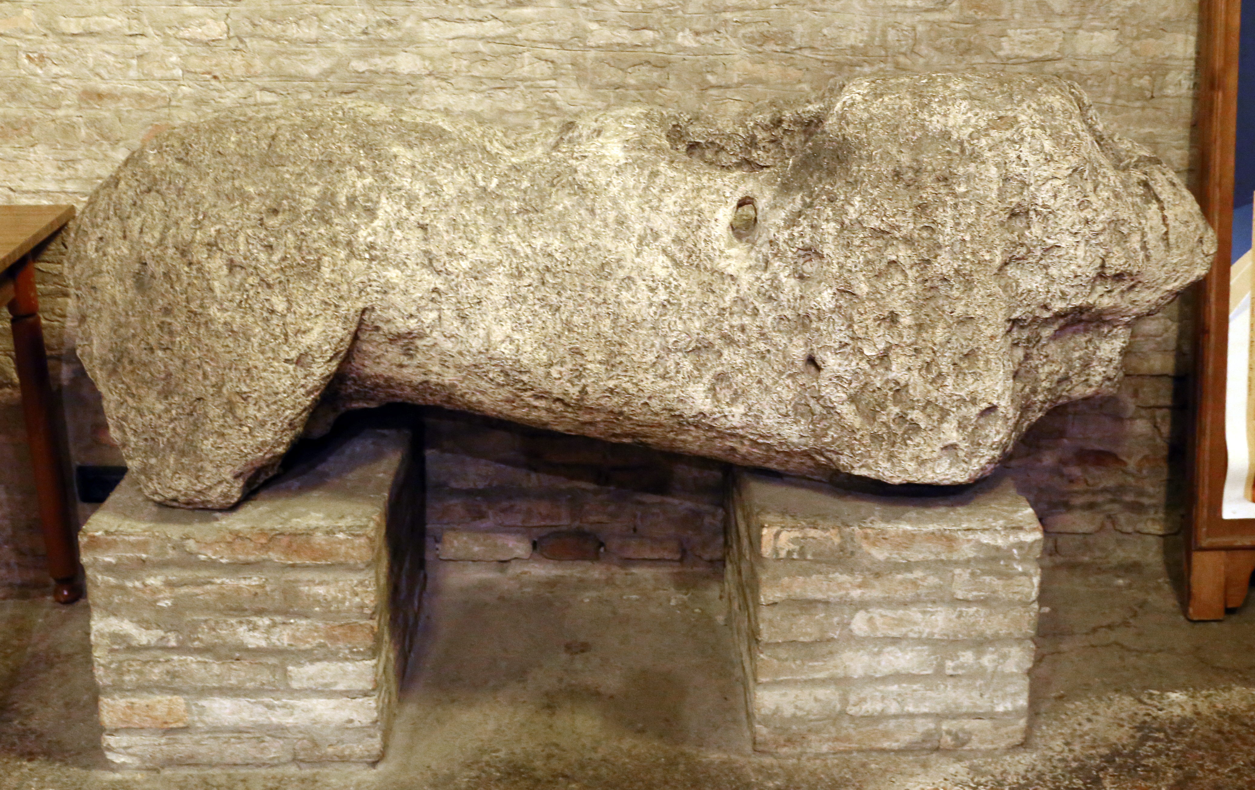 abbazia di San Mercuriale This is a photo of a monument which is part of cultural heritage of Italy.